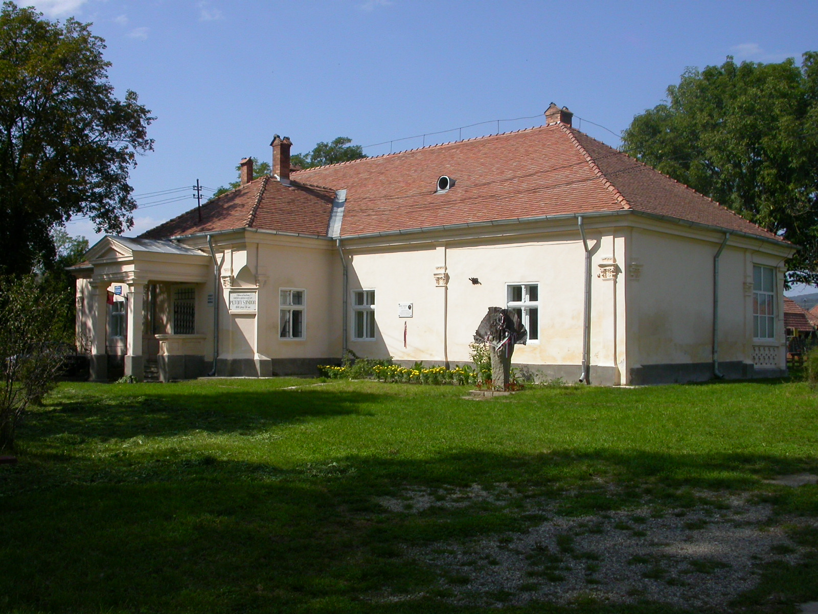 Conacul Gyárfás, sec. XVIII 01